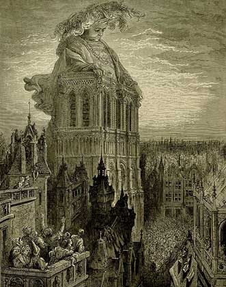 иллюстрация к роману "Гаргантюа и Пантагрюэль"